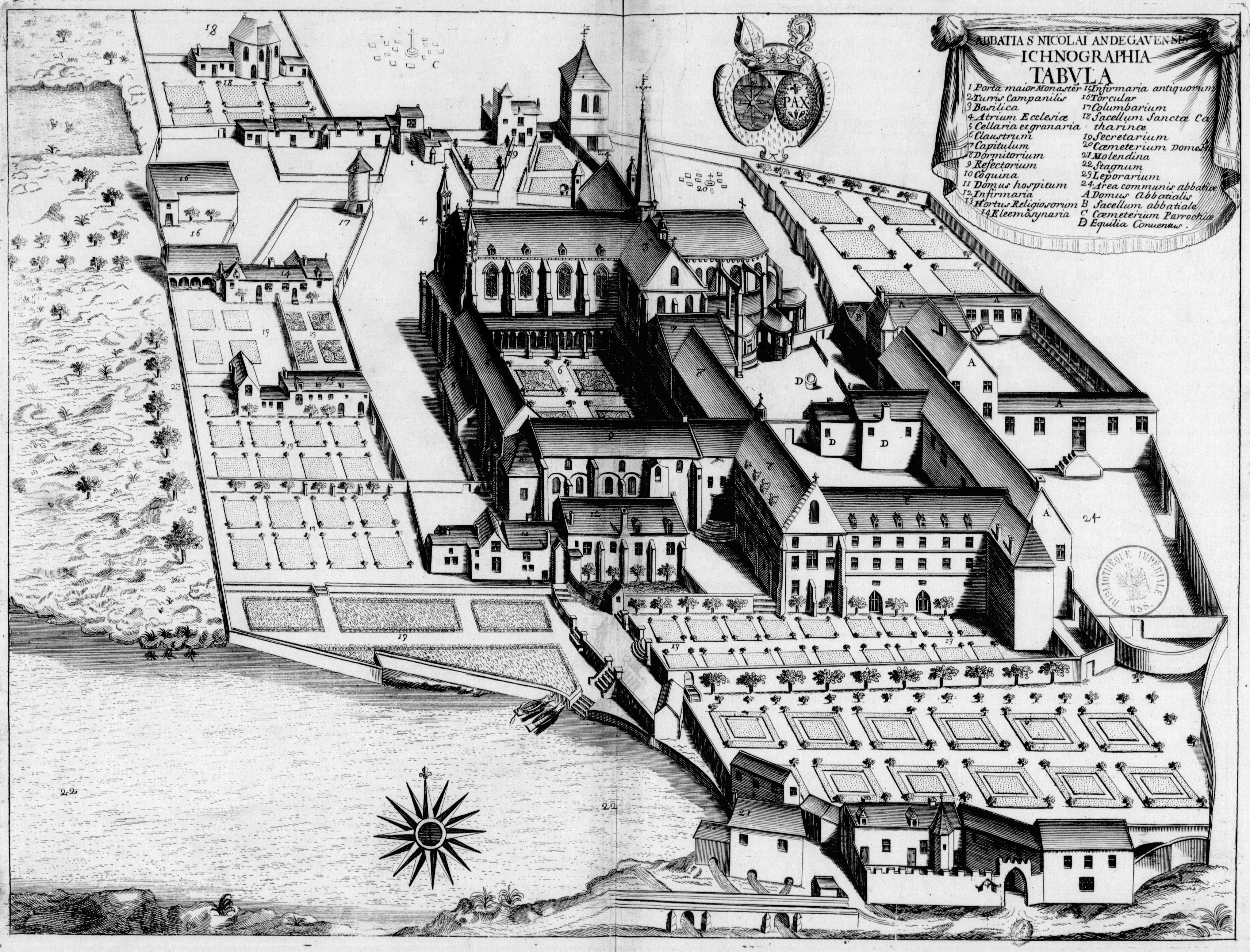 Planche gravée du 17ème siècle représentant l'abbaye Saint-Nicolas d’Angers, dans le livre Monasticon Gallicanum.